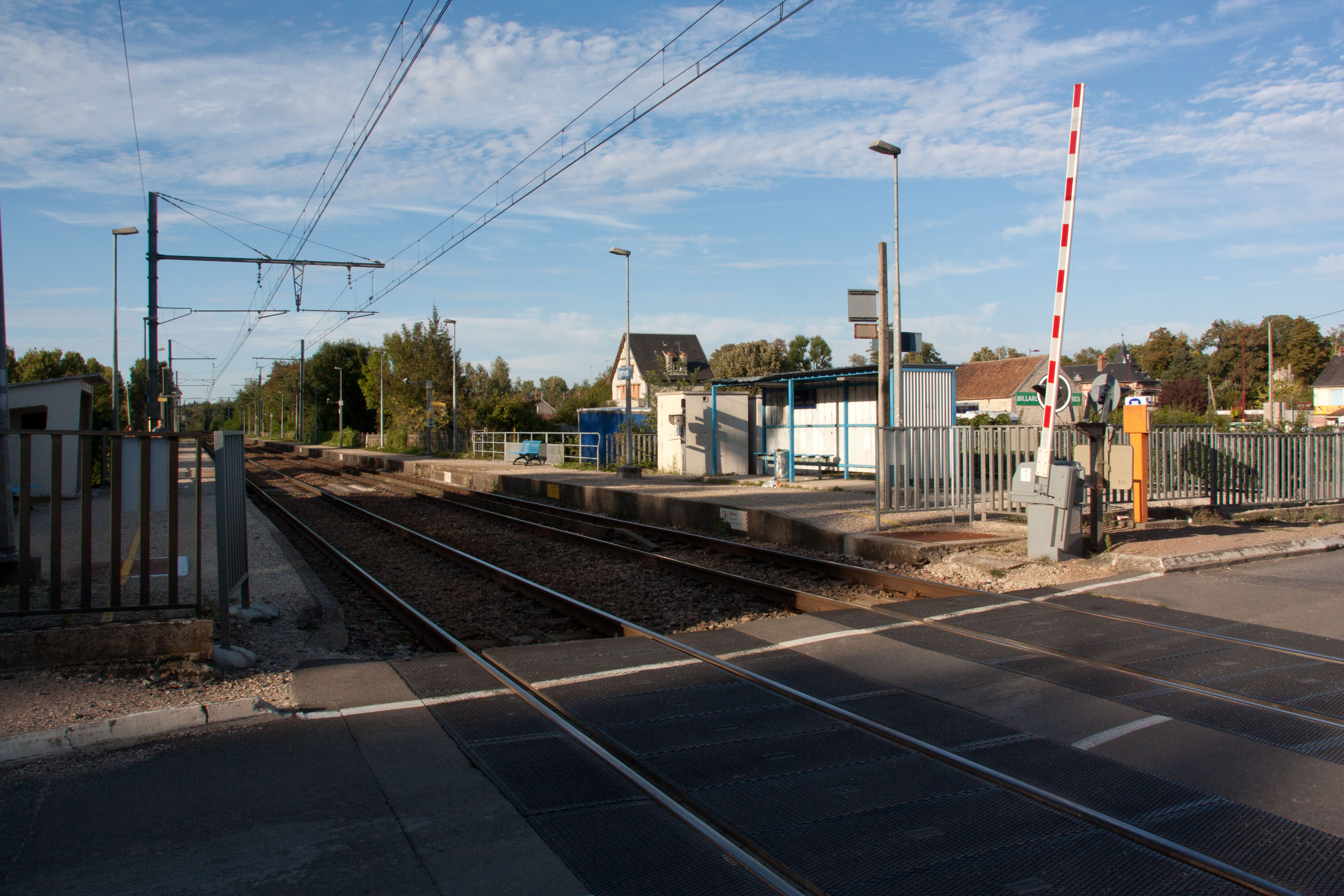 Gare de Dordives, Dordives, Loiret, France.